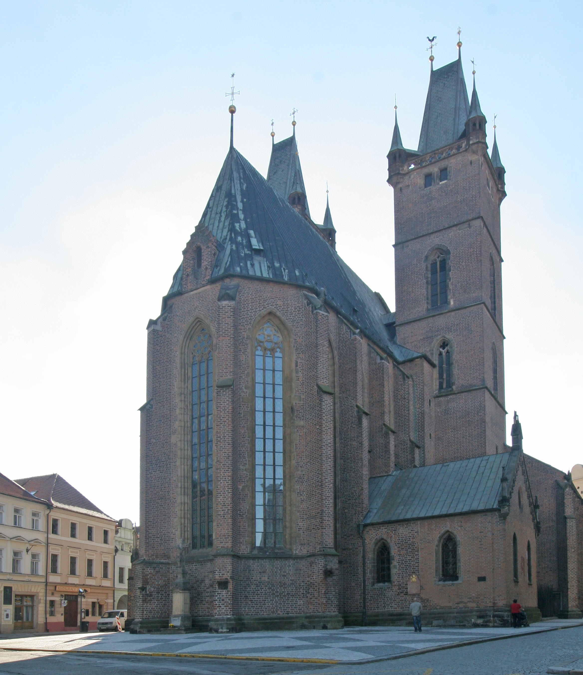 Kostel sv. Ducha, katedrální (Hradec Králové), Velké nám., Hradec Králové